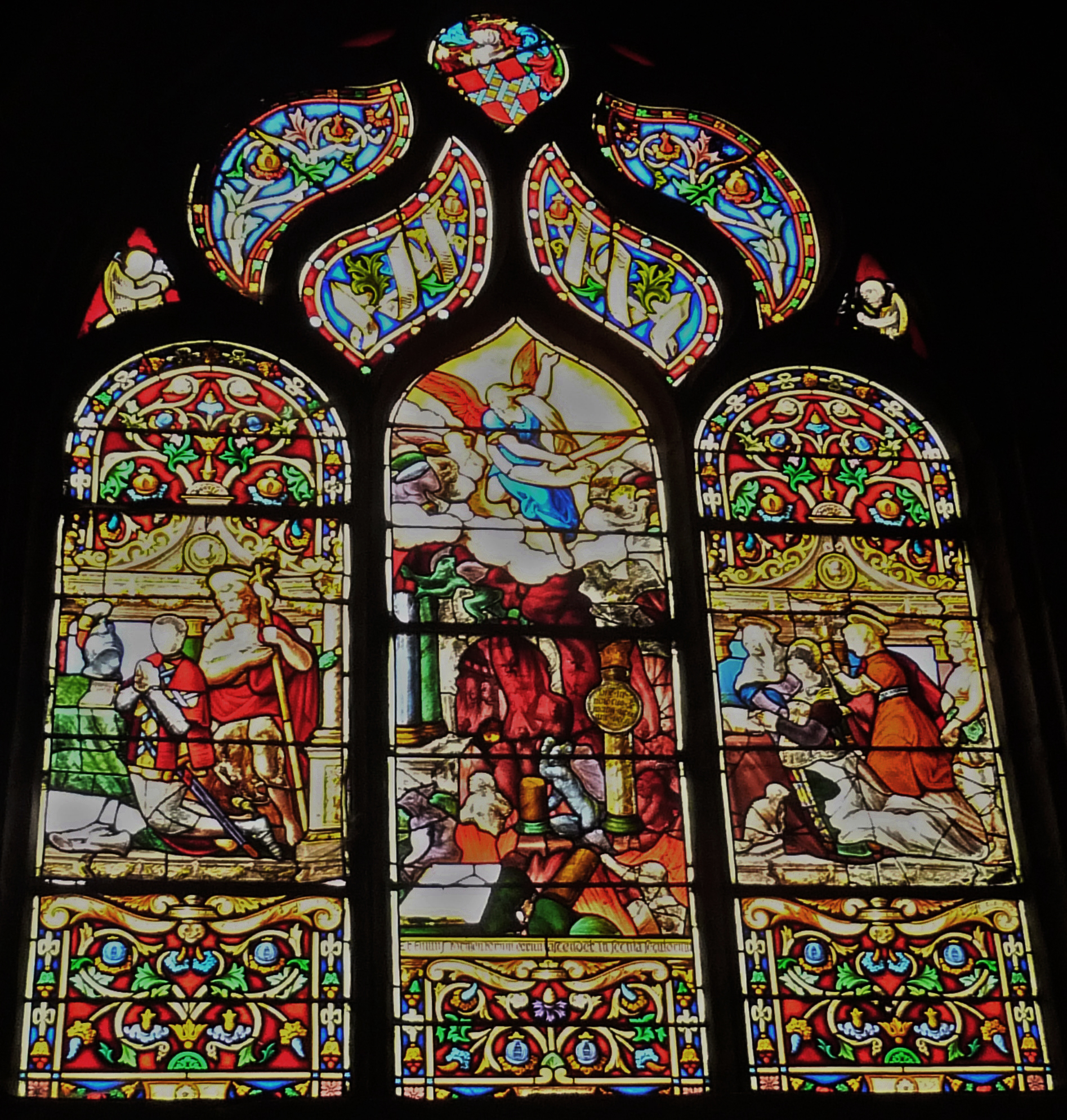 Saint-Pol-de-Léon : cathédrale Saint-Paul-Aurélien, vitrail 1